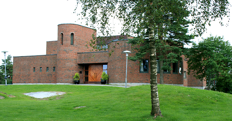 Nanset church, Larvik, Norway.